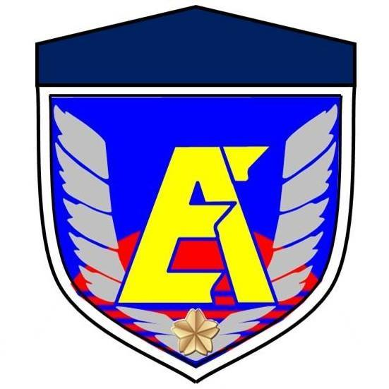 陸上自衛隊 東部方面隊 部隊章